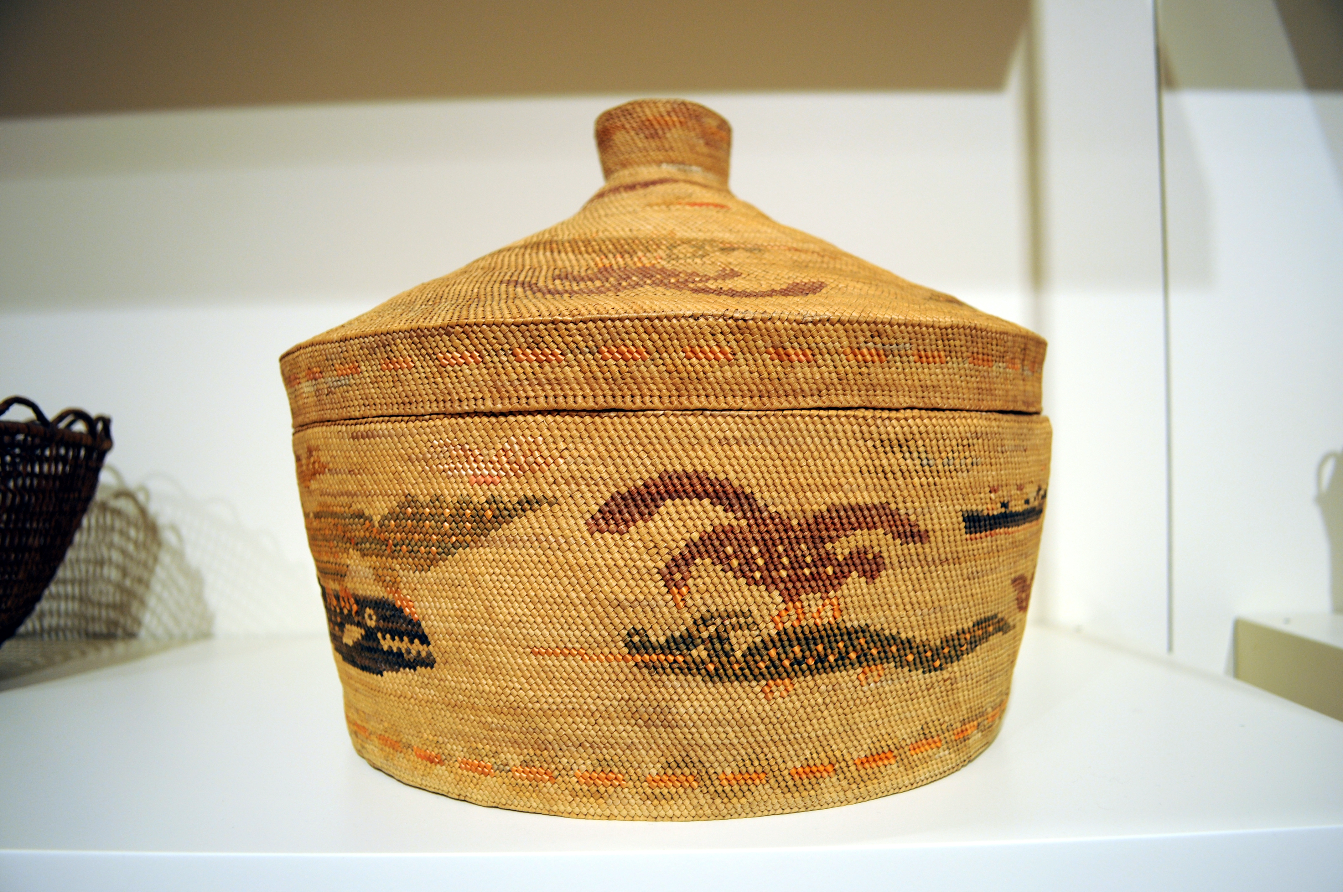 Makah basket